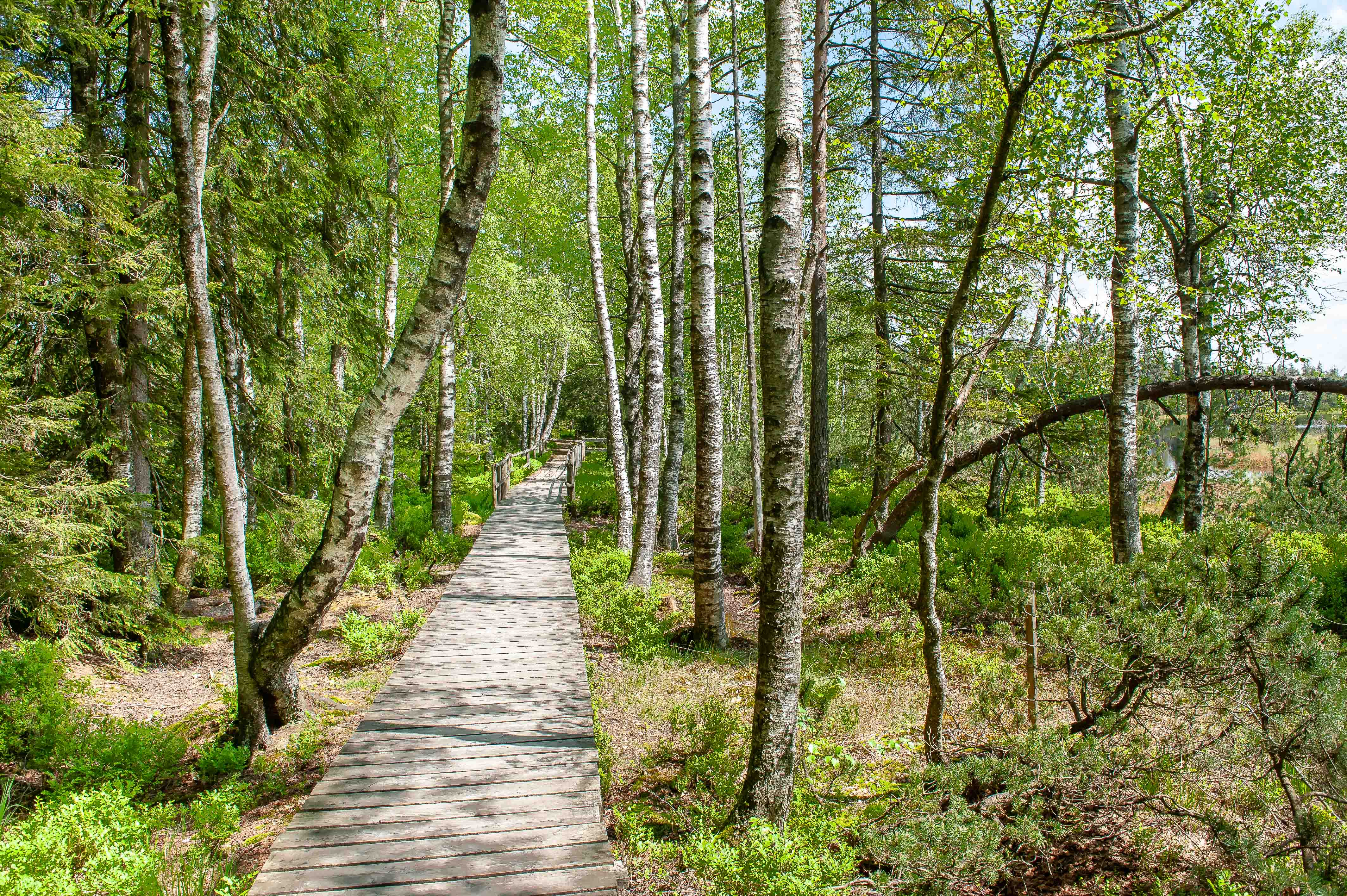 Wildsee bei Kaltenbronn, Schwarzwald